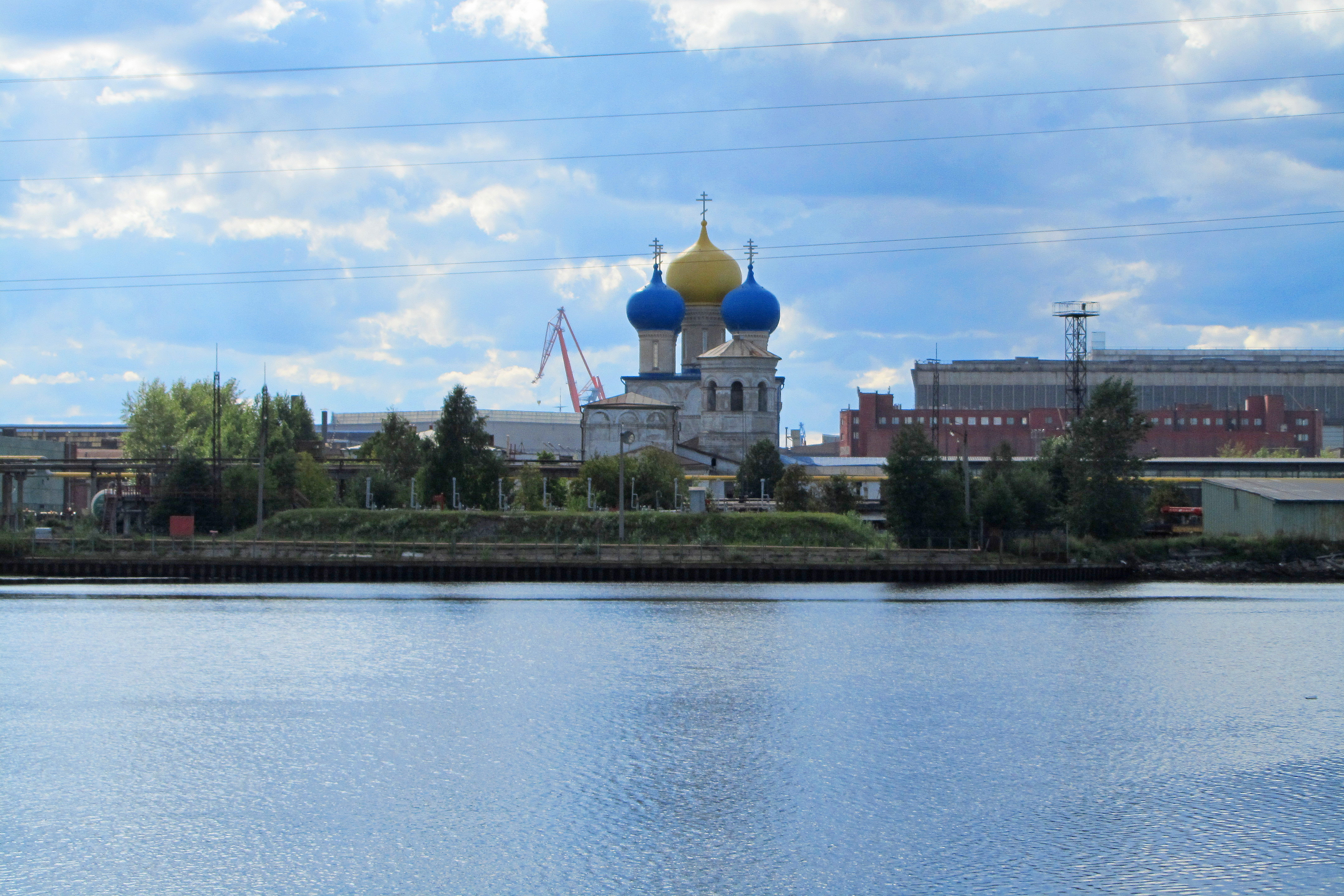 Николо-Корельский монастырь. Вид с Чаячьего полуострова